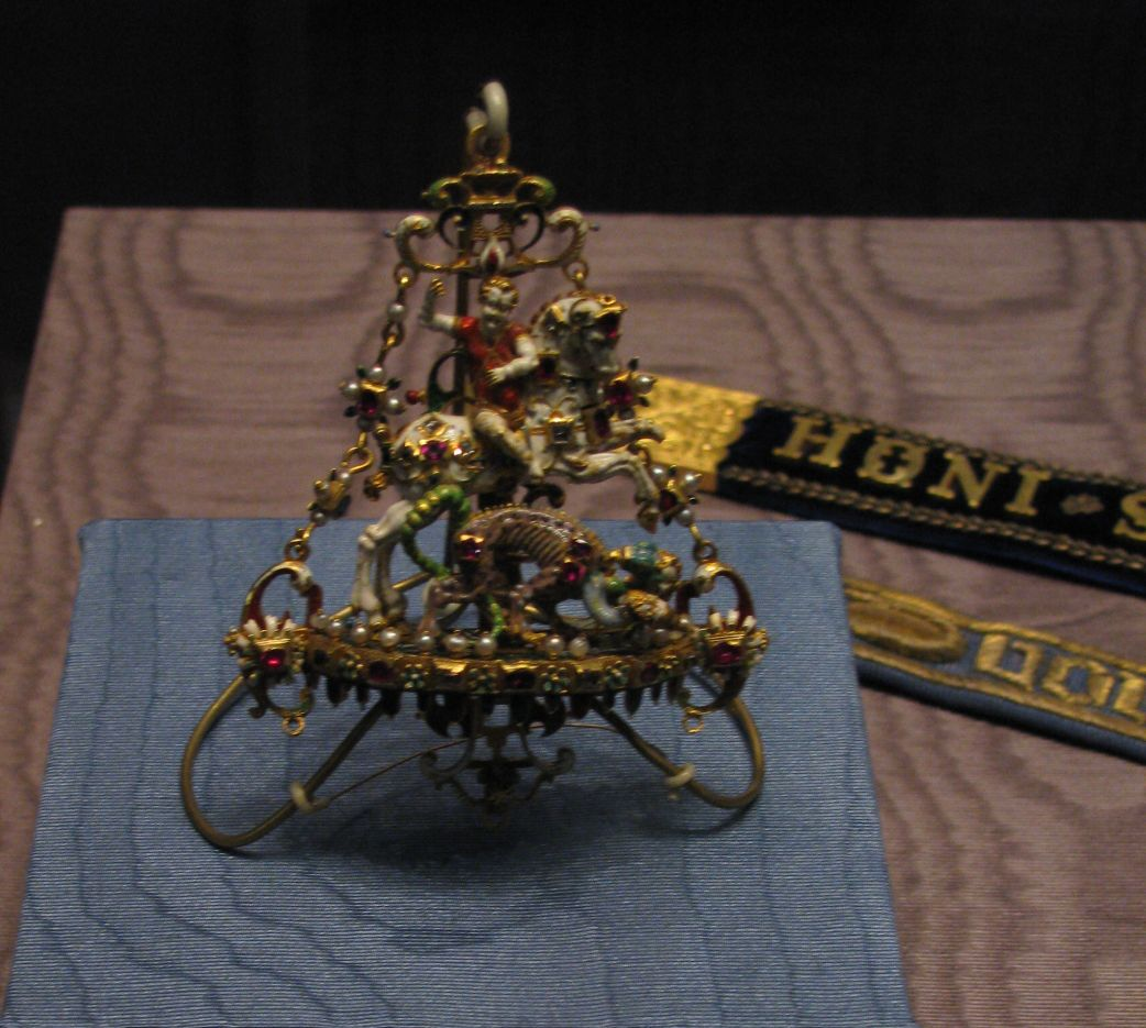 Подвеска со святым Георгием. Западная Германия. Конец 16-начало 17 века.